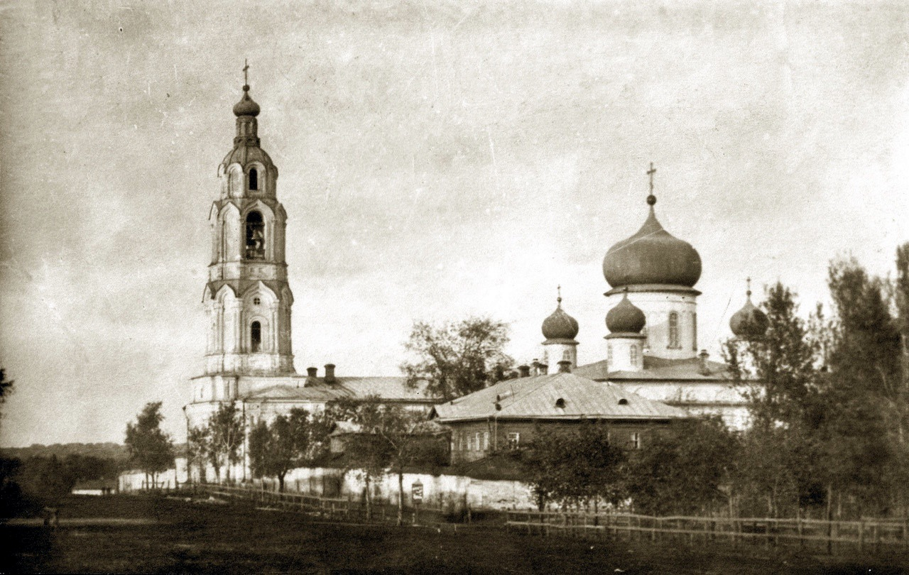 Кирсанов. Церковь Тихвино-Богородицкого монастыря и колокольня (1911г).